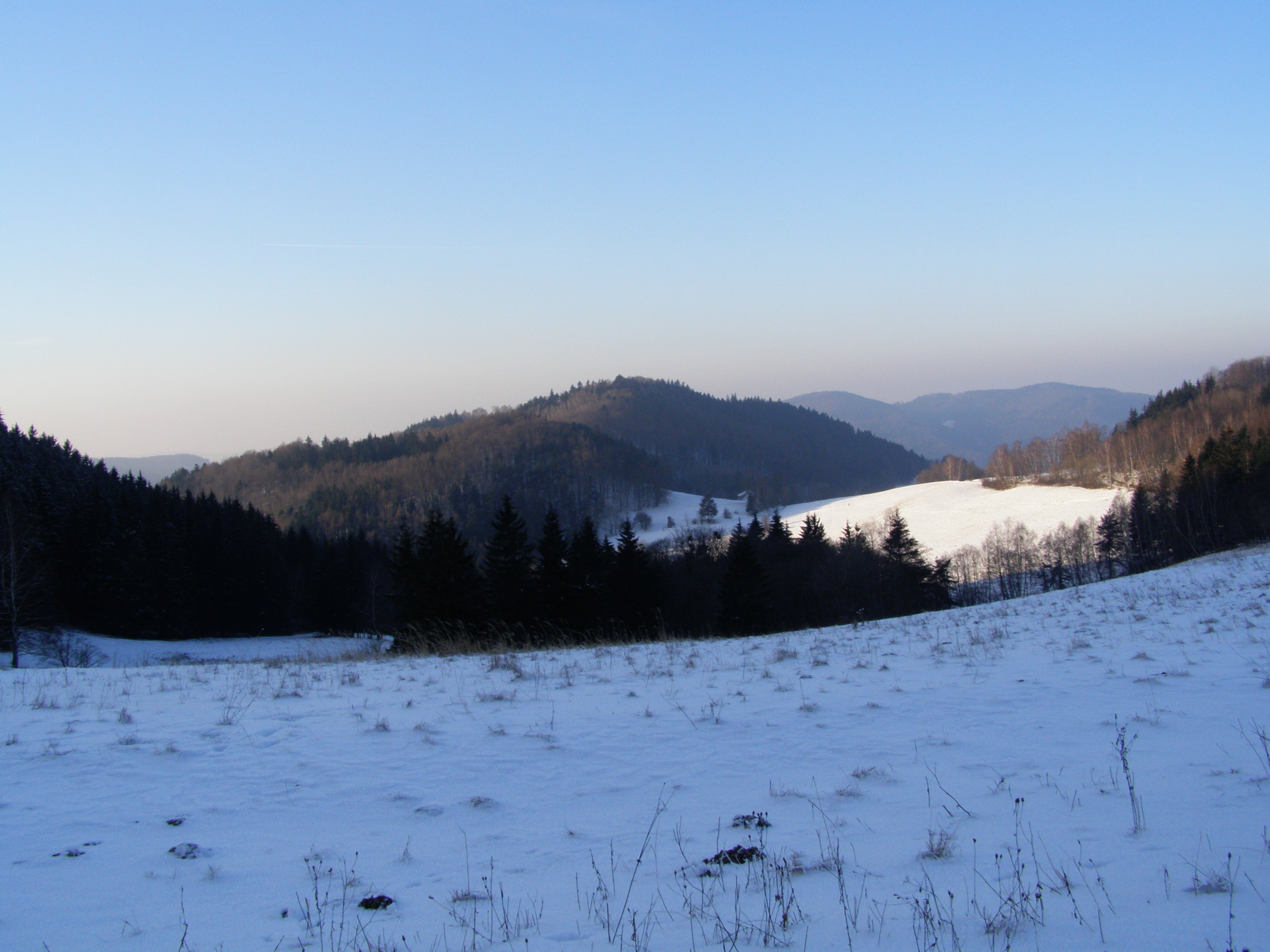 Hostýnské vrchy, Klapinov, výhled na jihozápad